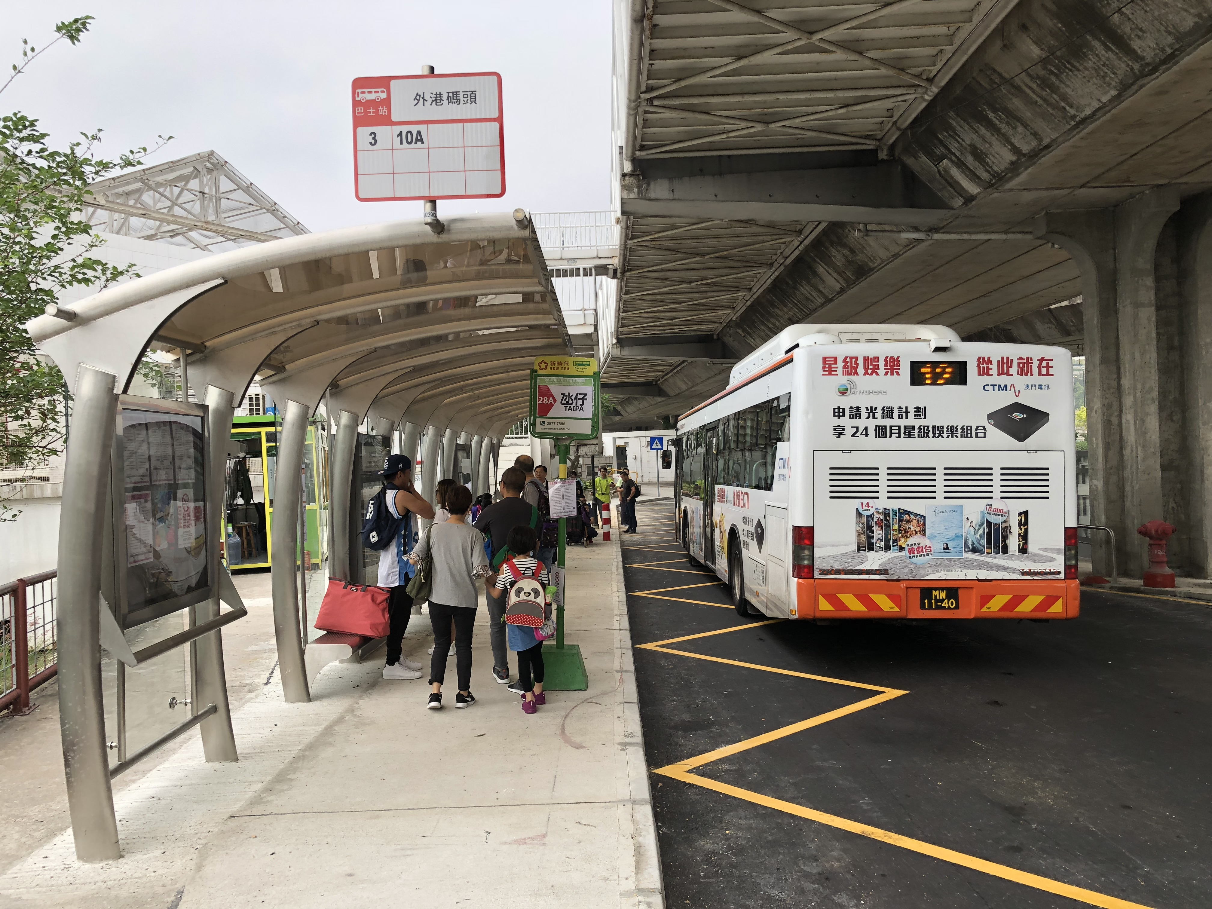 2018年4月的外港碼頭站.